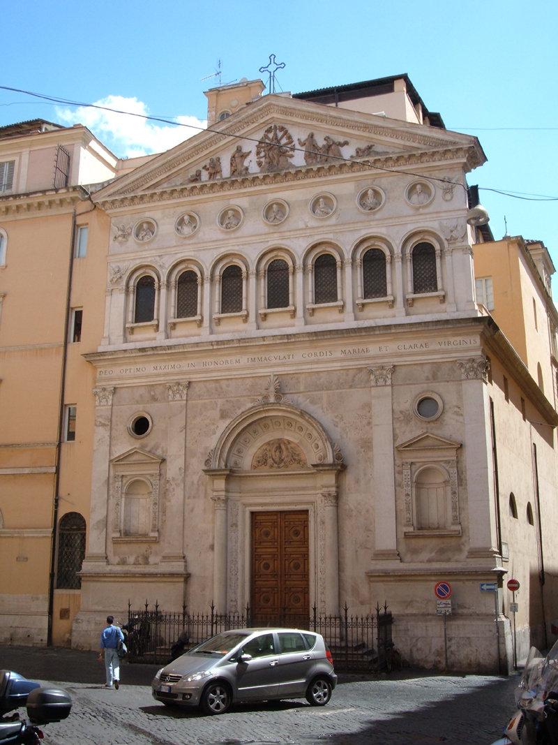 Chiesa di Santa Chiara, a Roma, nel rione Pigna. Foto personale.